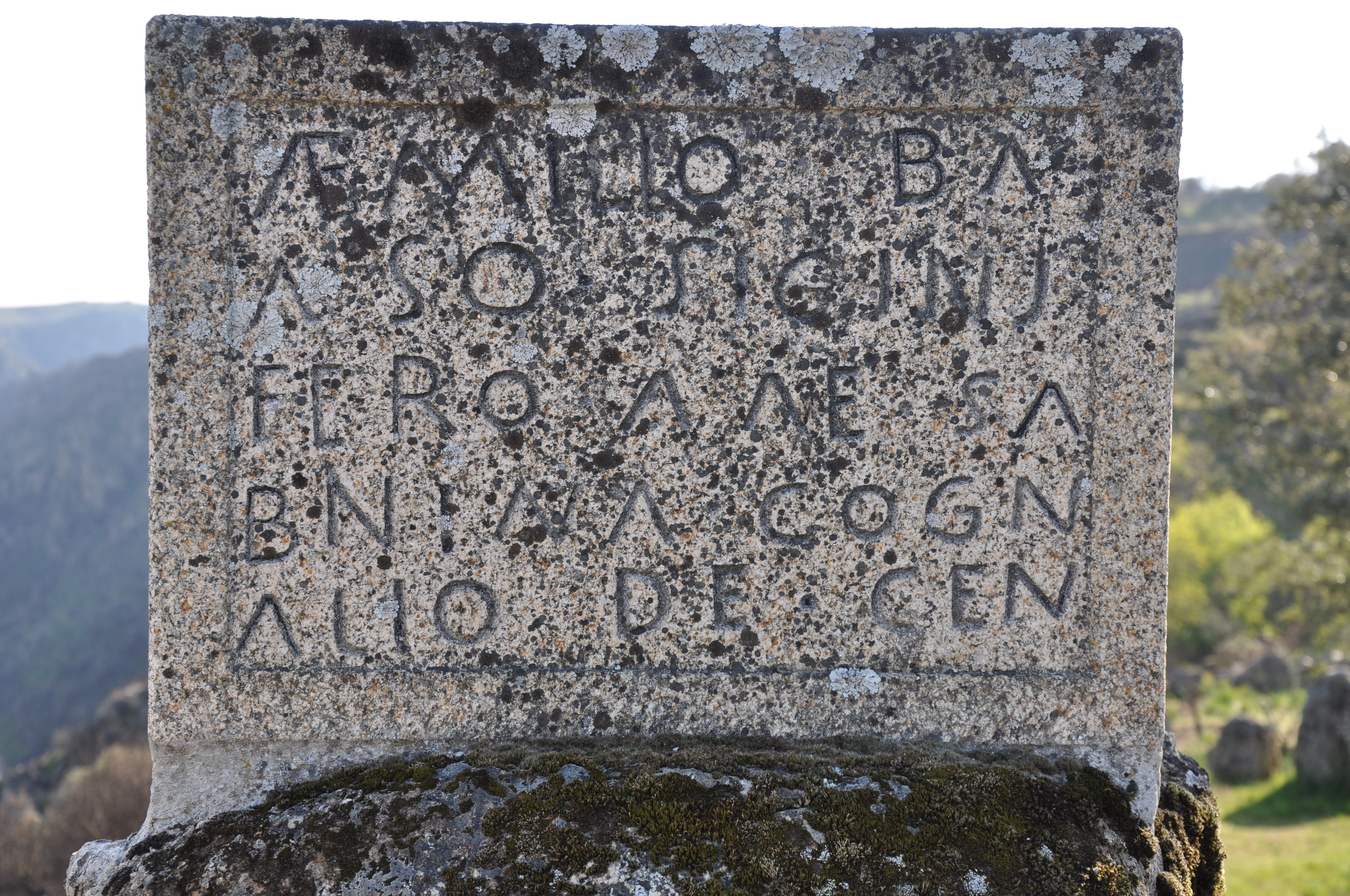 Reproducion de la inscripción romana encontrada en la ermita de San Juan de las Arribas, Aldeia Nova, Portugal. Corresponde con EE VIII, 128 = EE IX, p 110 = AquaeFlaviae 215 = HEp 7, 1173: Aemilio Bal/aeso sig{i}ni/fero alae Sa/binianiae ogn/atio de(dicavit) gen(tili) s(uo)